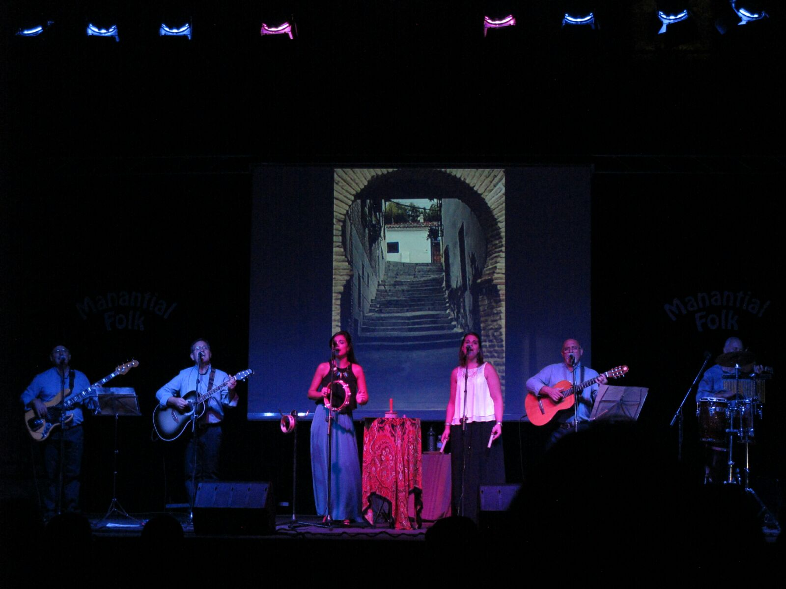 Concierto de Manantial Folk en Arenas de San Pedro